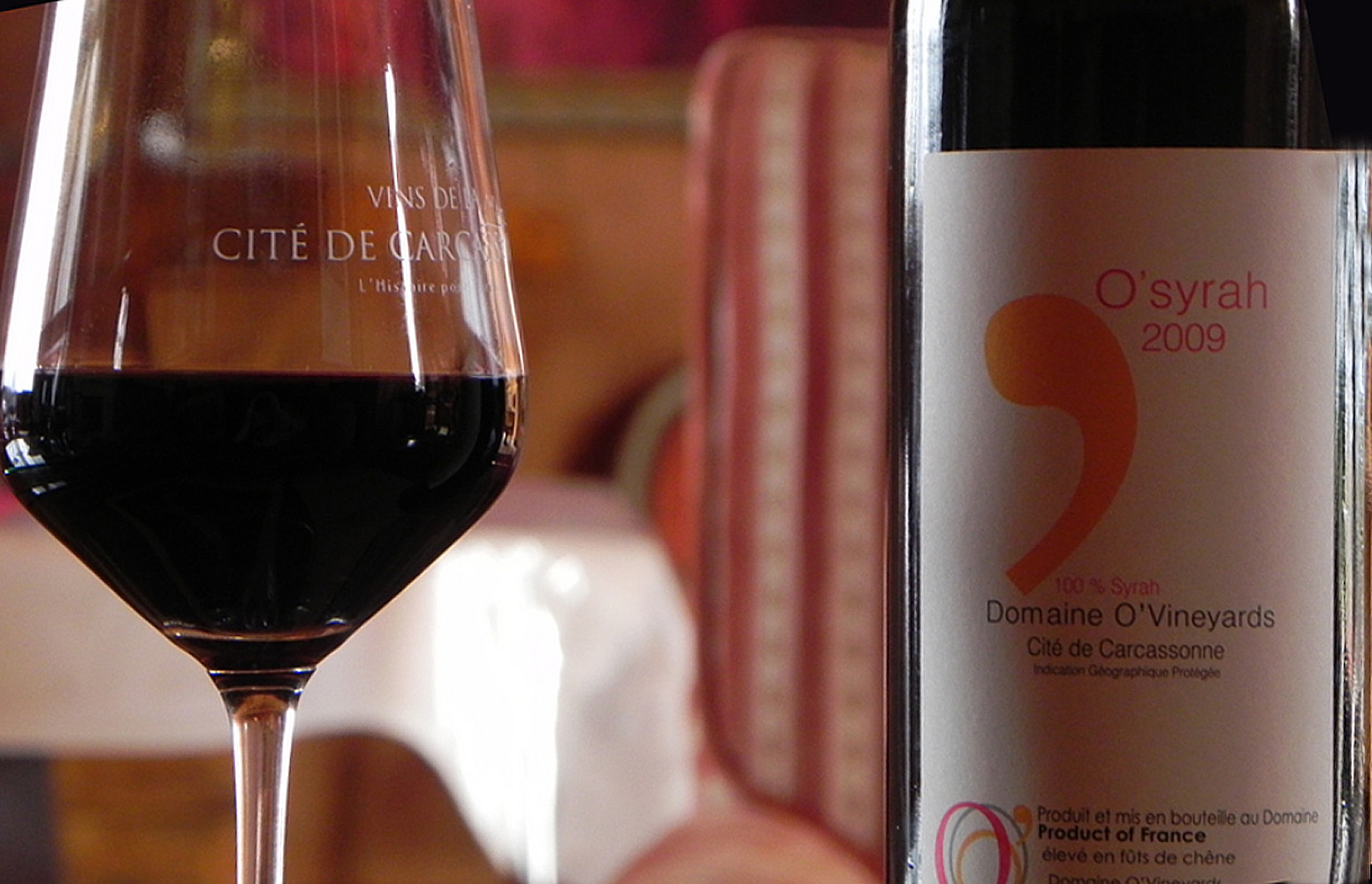 Verre et bouteille de l'IGP cité de Carcassonne